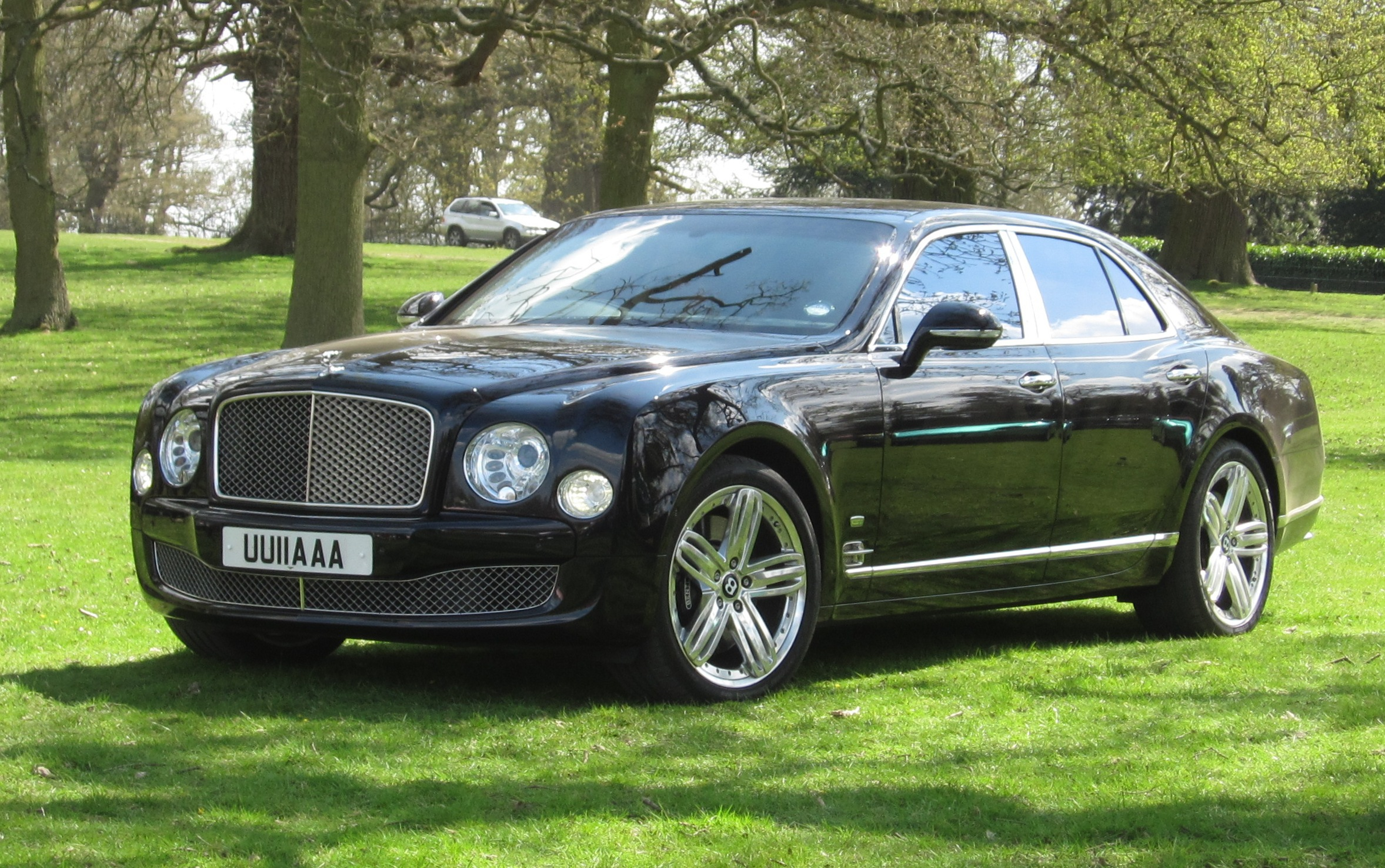 Bentley Mulsanne (2012)